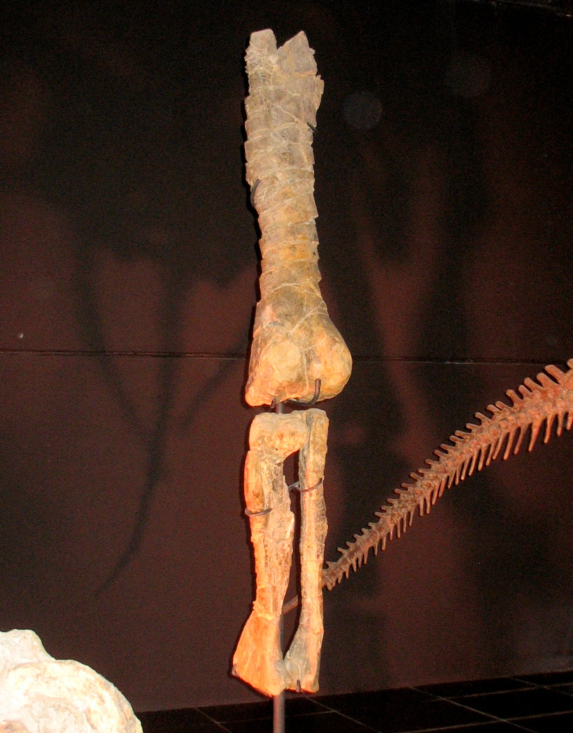 Tastavinsaurus de El Castellar (Teruel, España). Fémur, tibia y fíbula izquierdos. En exposición en el museo paleontológico de Dinópolis.